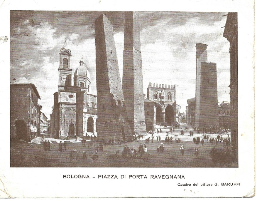 Bologna - piazza di Porta Ravegnana